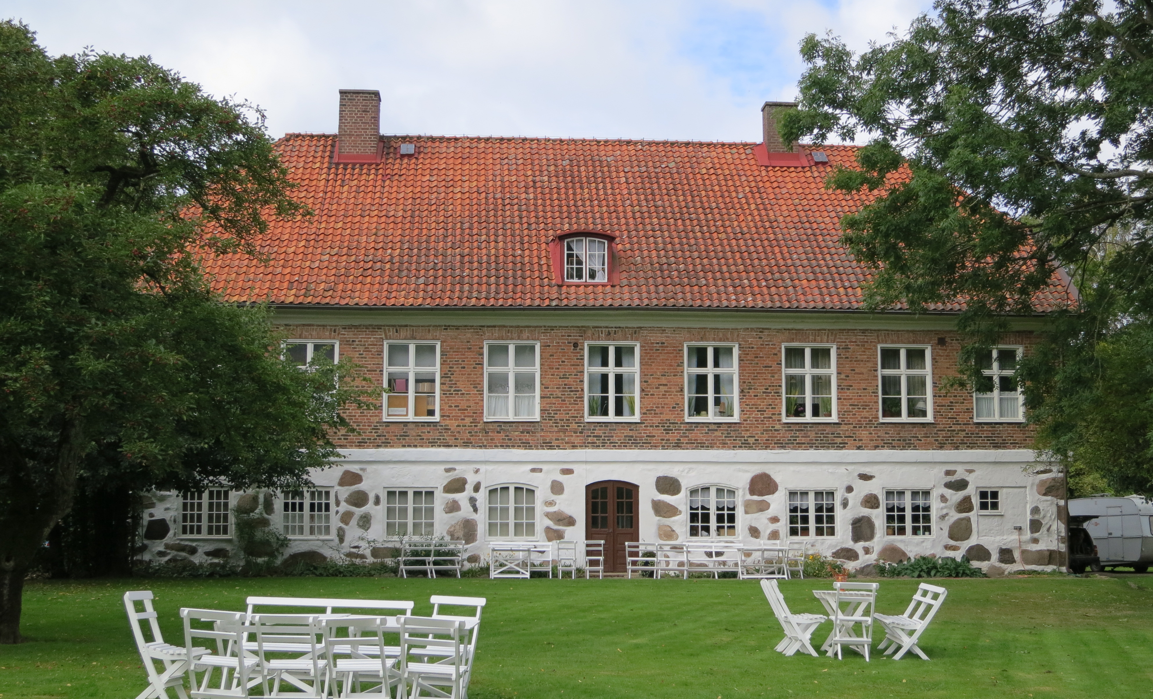 Norra Vrams prästgård, nu hembygdsmuseum